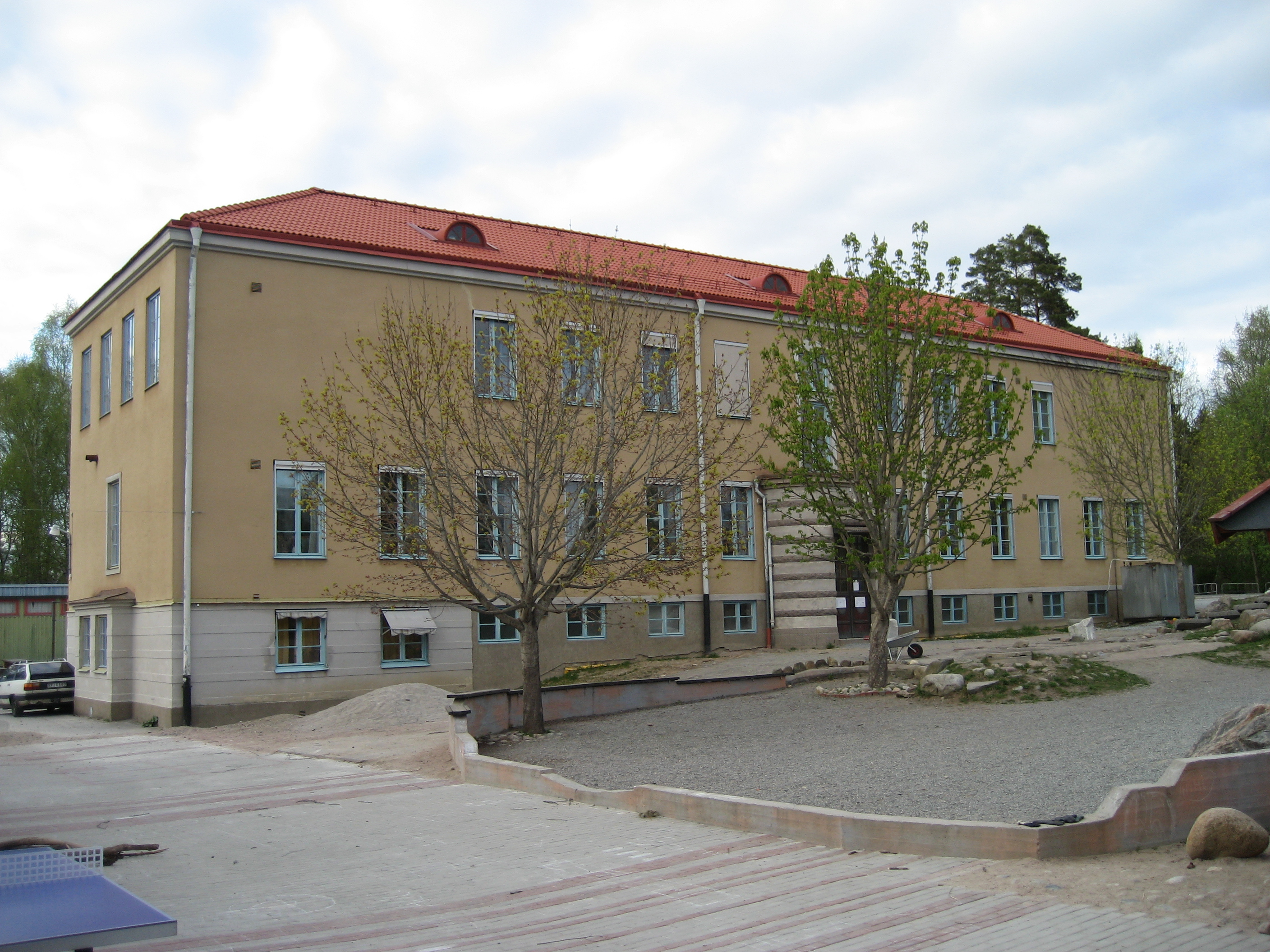 Örebro Waldorfskola, Sweden